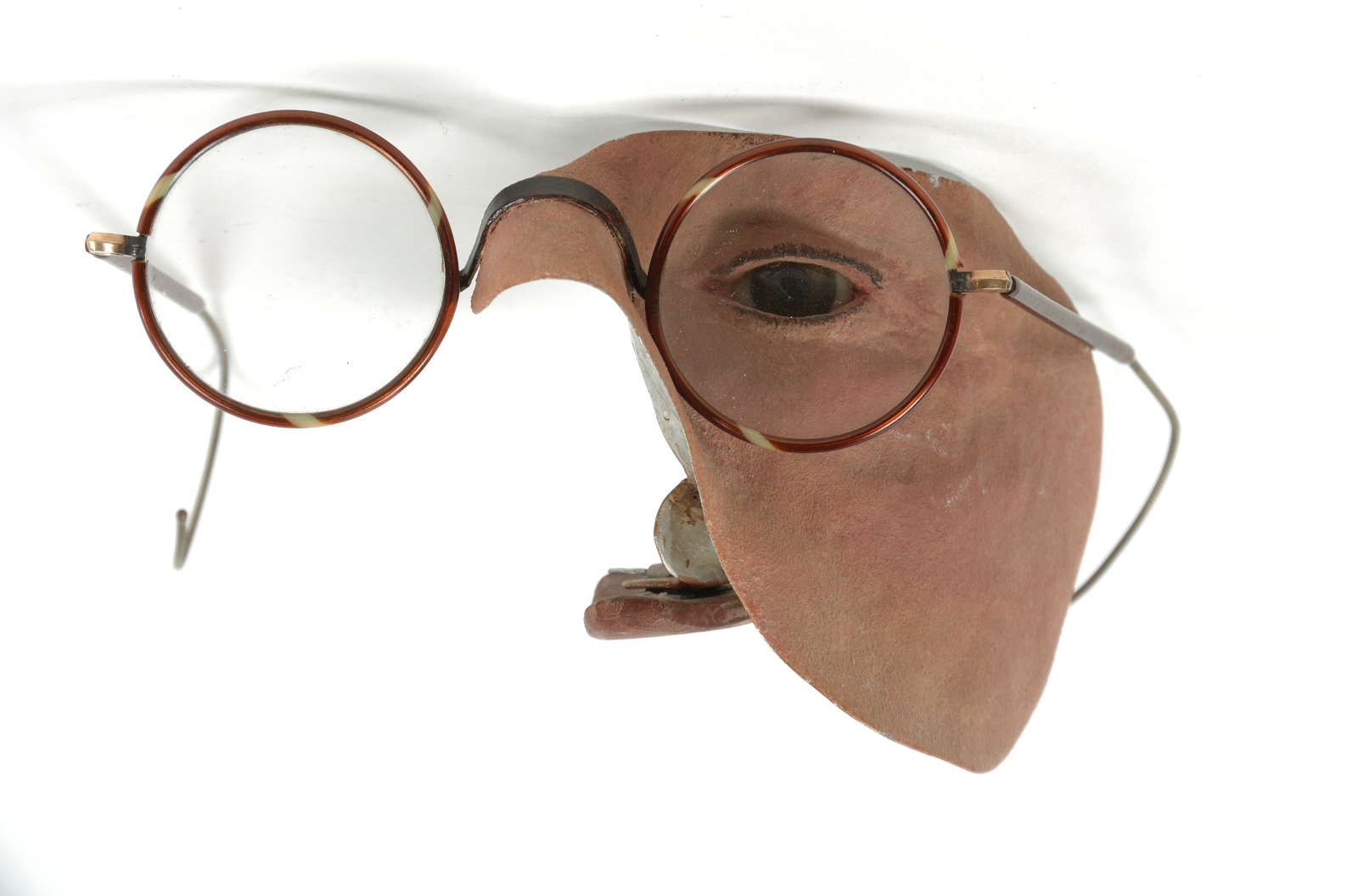 Johannes Esser Vanaf 1915 tot in de Tweede Wereldoorlog, Duitsland. Het verhaal Johannes Esser was een Nederlandse arts. Helaas is er weinig over hem bekend in Nederland. Almar Seinen vindt dat deze persoon onderbelicht is gebleven, want hij heeft veel betekend voor de plastische chirurgie in Nederland. Er is ook een instituut in Amsterdam naar hem vernoemd, dat ook zijn archief beheerd. Hij heeft veel geopereerd in Duitsland en daar ca 20.000 gezichtsreconstructies gedaan. De geallieerden wilden geen gebruik maken van zijn diensten omdat hij niet beschikte over de juiste papieren. De Duitsers wilden wel graag gebruik maken van zijn kennis. Hij kreeg een hospitaal in Brühl toegewezen. De heer Seinen heeft 7 boeken over dit onderwerp meegenomen. Hij is over Esser gestruikeld min of meer door het voorbereiden van een tentoonstelling over Nederland en de Eerste Wereldoorlog. Het boekjes 'Was Aerztekunst vermag' geschreven door een Duitse soldaat, die aan het gezicht gewond is geraakt in WO1 en is geopereerd door Esser. Het boekje gaat over zijn verwonding en genezing en hij heeft het boekje opgedragen aan zijn arts Esser. 418 Prothese voor een gezichtsreconstructie met jukbeen, oog en bril uit 1920 en 1921.